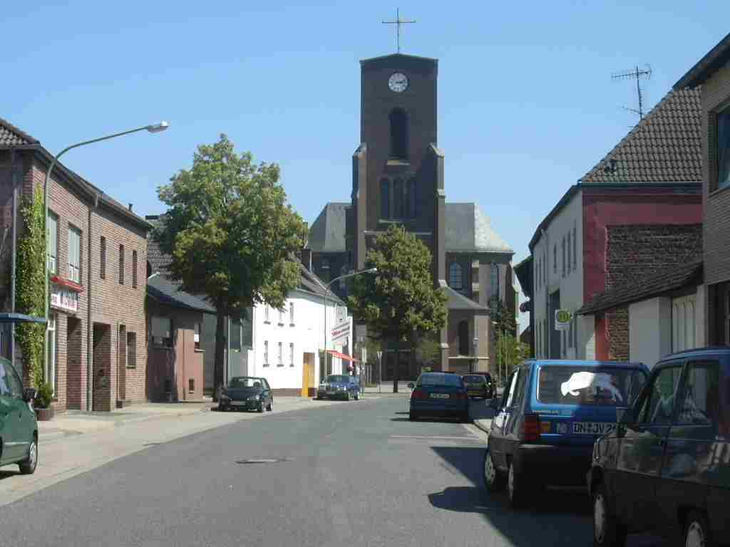 Echtz mit Kirche Own Work papa1234 2006-07-14